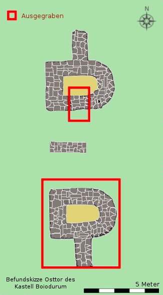 Befundskizze vom Osttor des Kastell Boiodurum, Passau (D).